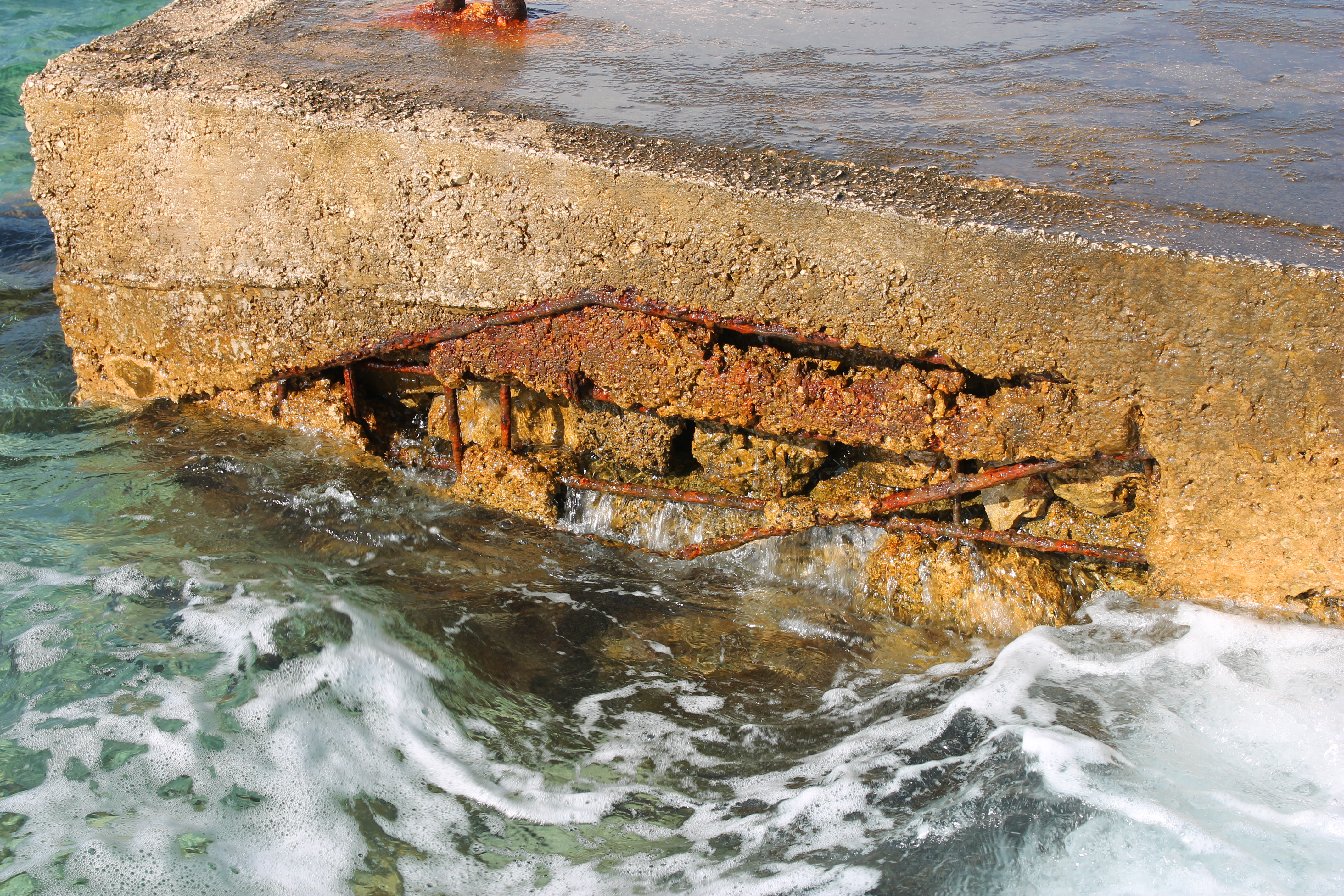 Maslinica, beton korodovaný působením mořské vody